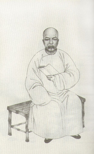 袁昶，清朝學者。Yuan Chang